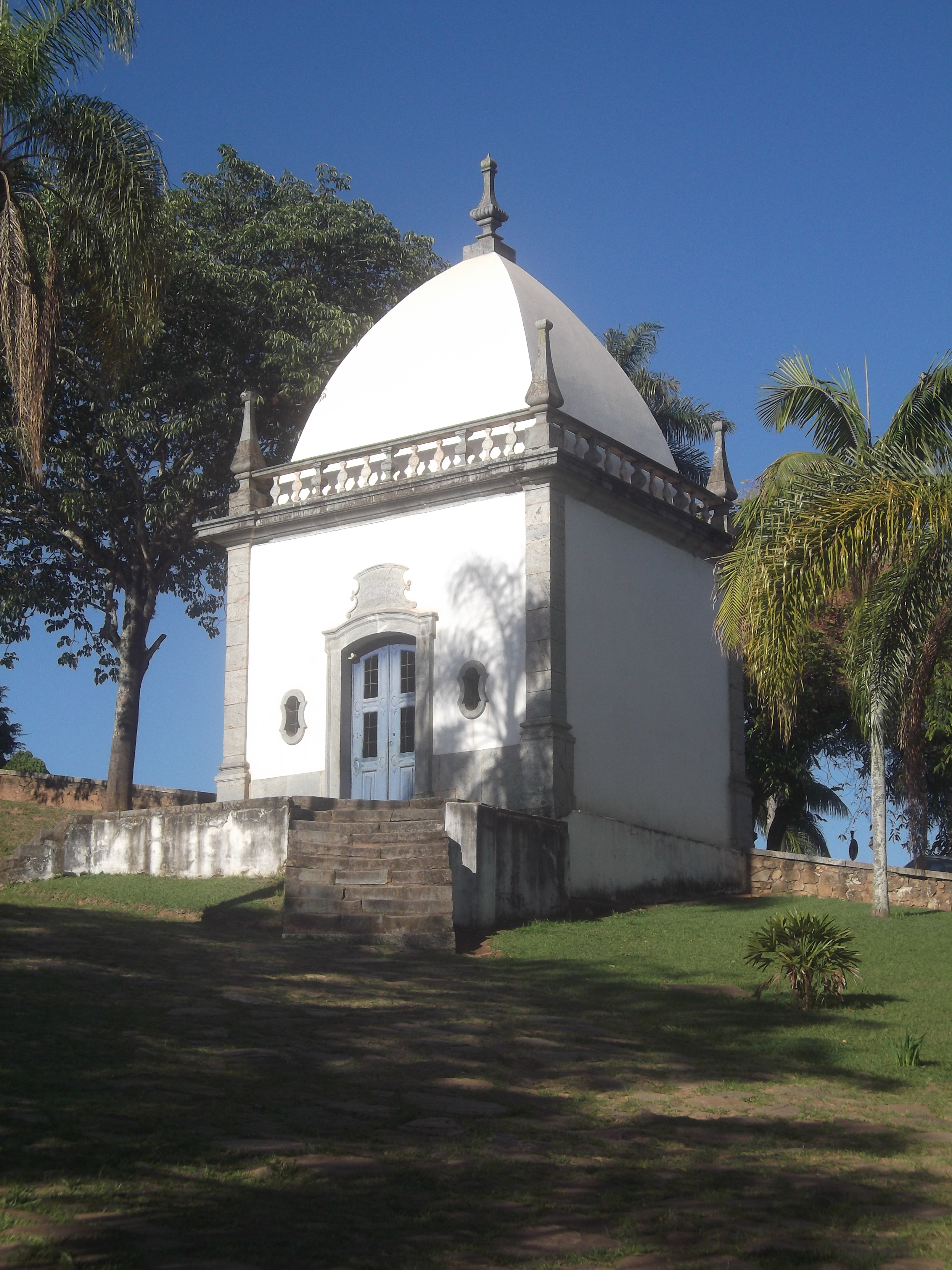 Santuário do Bom Jesus de Matosinhos